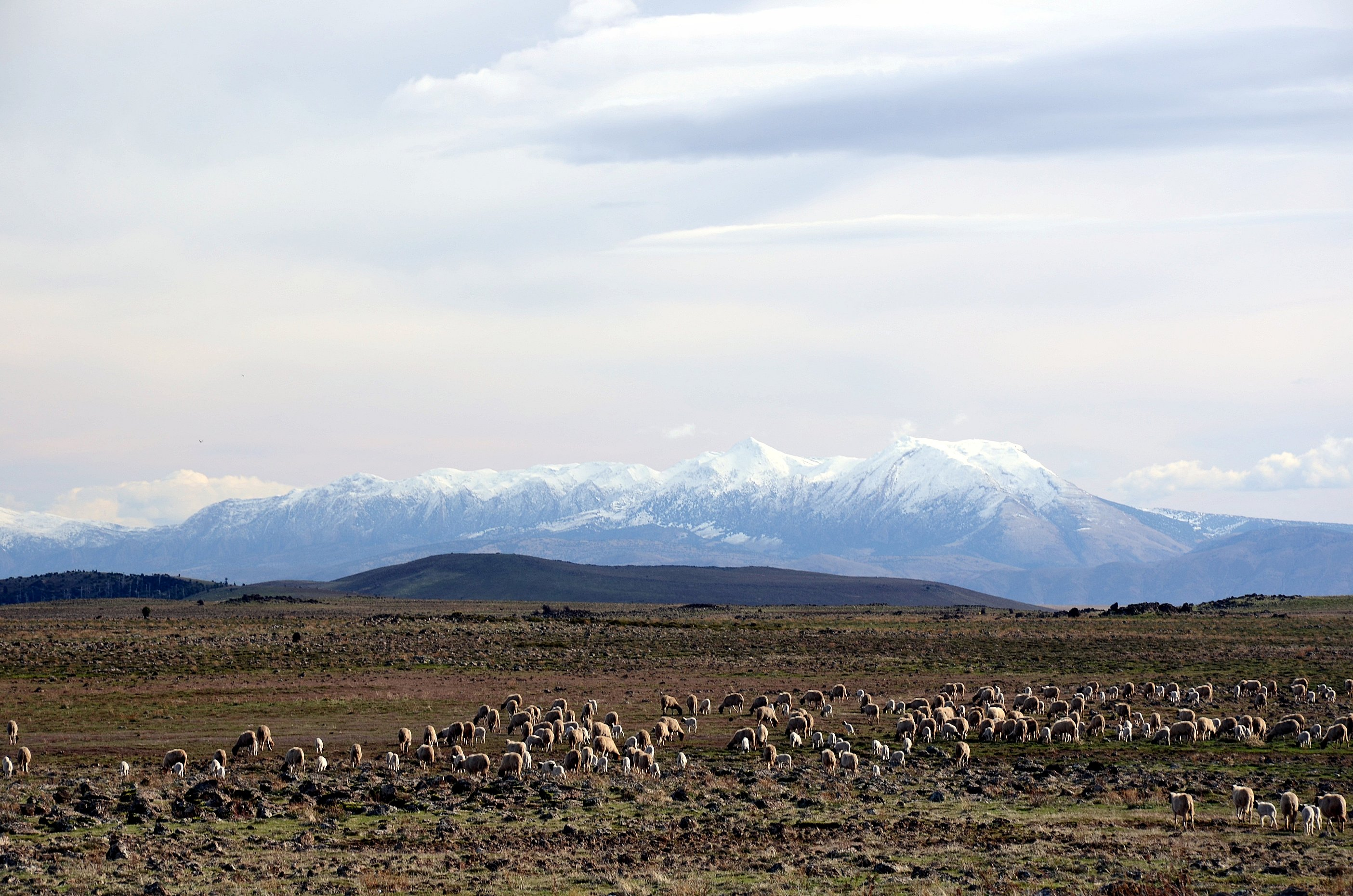 Средний Атлас